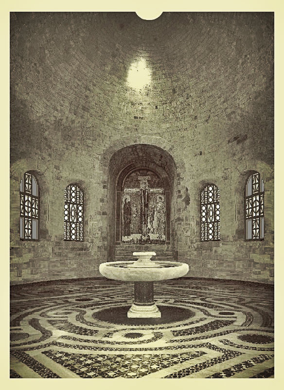 San Salvatore (Terni). Progetto di restauro di Arnaldo Dell'Ira, 1941. Fotomontaggio con ritocchi a inchiostro. Archivio Dell'Ira.